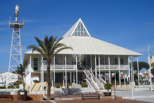 El Ayuntamiento de Punta Umbria.